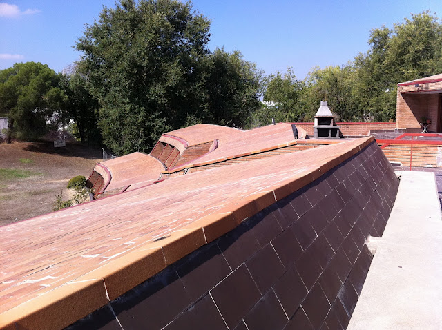 COLEGIO MAYOR NUESTRA SEÑORA DE LUJAN, vista desde la terraza del nivel de acceso